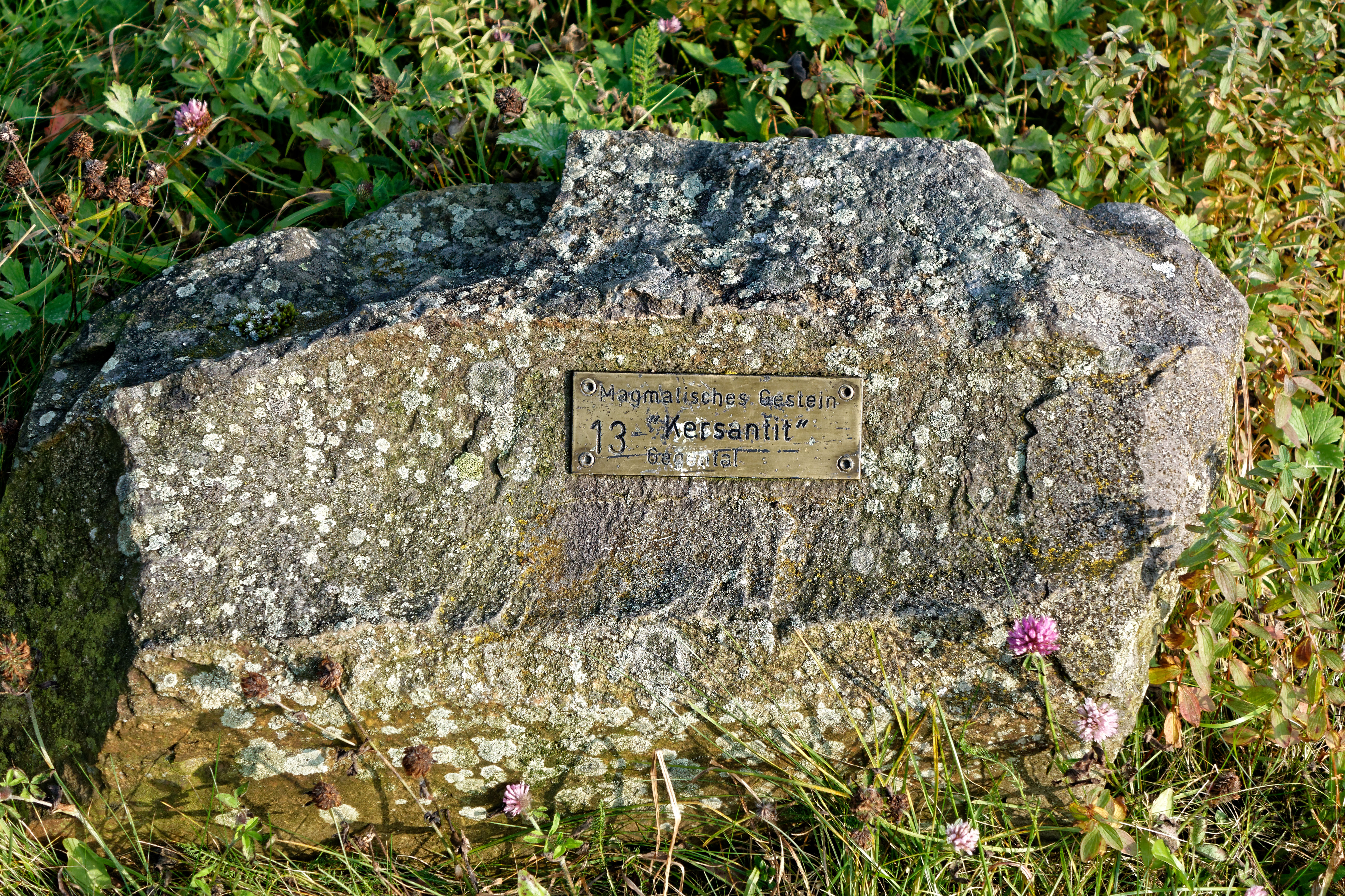 Kersantit Gestein auf dem gesteinskundliche Lehrpfad auf der Jordanshöhe bei Sankt Andreasberg